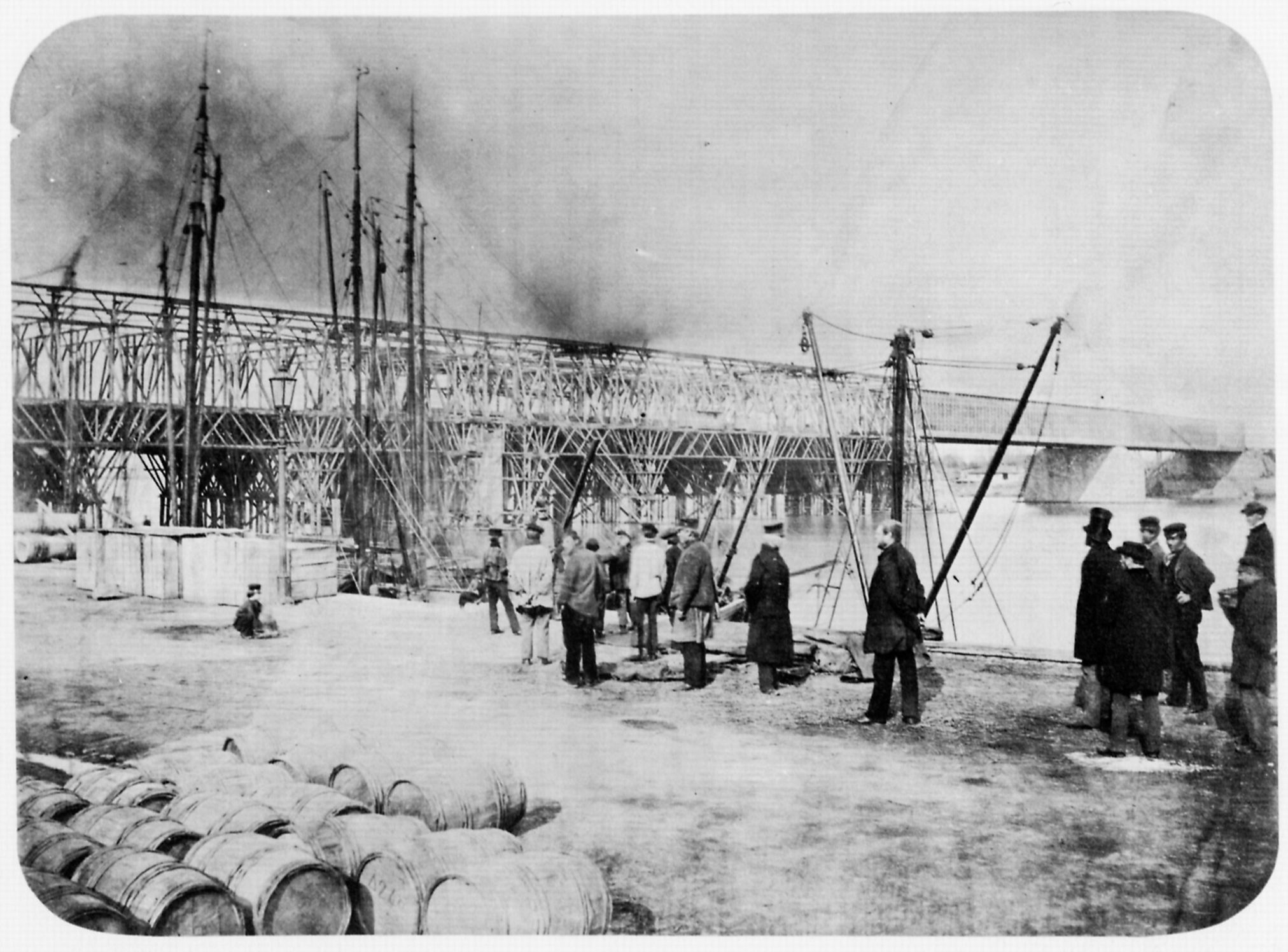 Originale Bildunterschrift: Eisenbahnbrücke in Köln im Aufbau